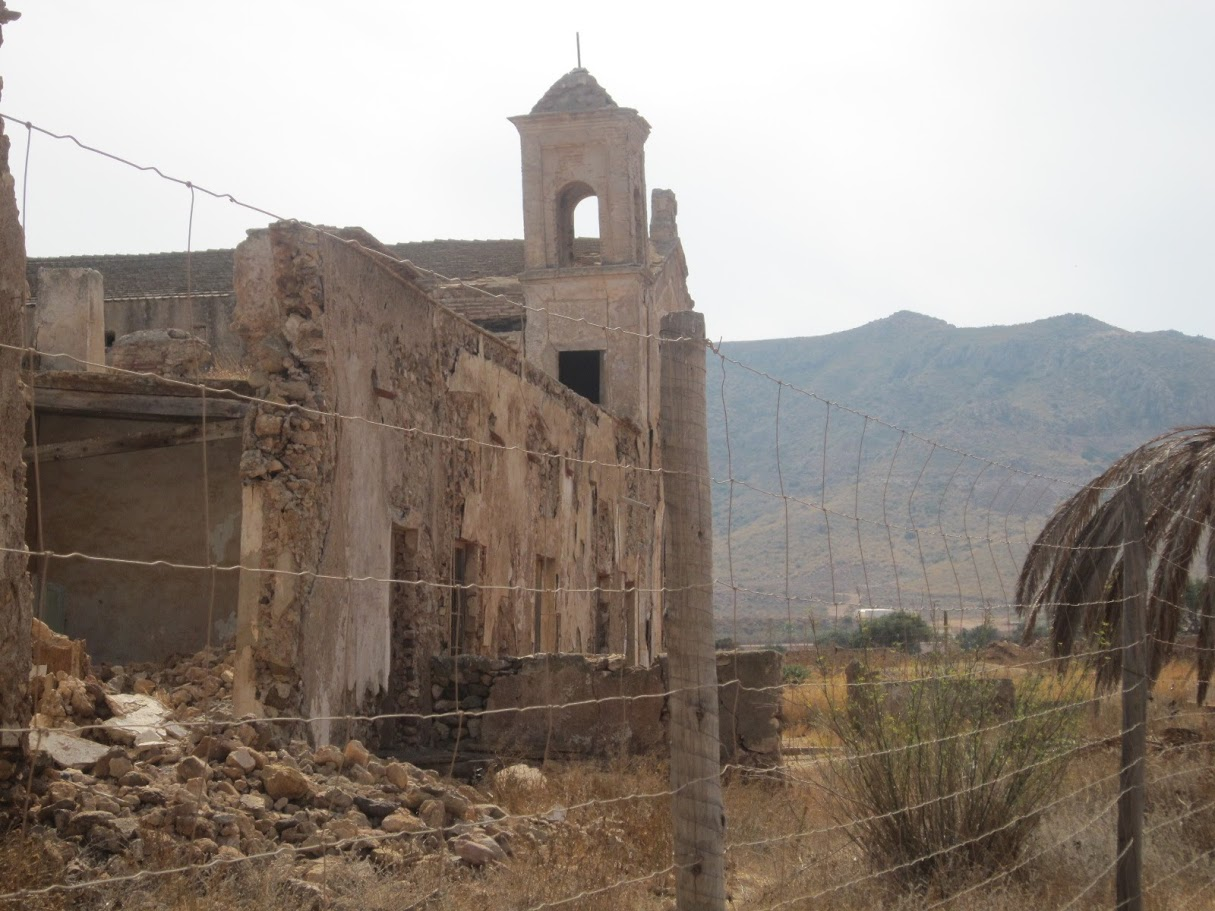 Parque natural del Cabo de Gata-Níjar This is a photography of a Special Area of Conservation in Spain with the ID: ES0000046. Natura2000 entry, EEA entry